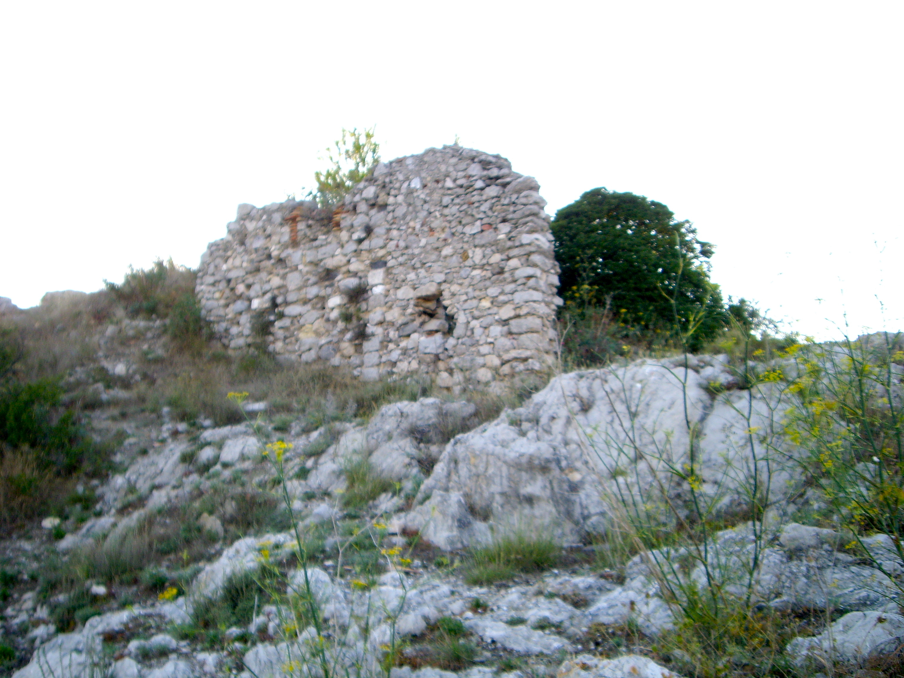 Mur en ruines sur le rocher de La Galline, hameau de la Nerthe, quartier L'Estaque. GPS 43.378862, 5.295944 D'après base Mérimée « Le cadastre de 1819 signale un hameau au pied d' un rocher, où subsistent des constructions partiellement ruinées comportant des tours, vestiges probables d' un château fort (les tours étaient encore visibles en élévation au début du 20e siècle) » A distinguer des ruines du « château de l'air » ?